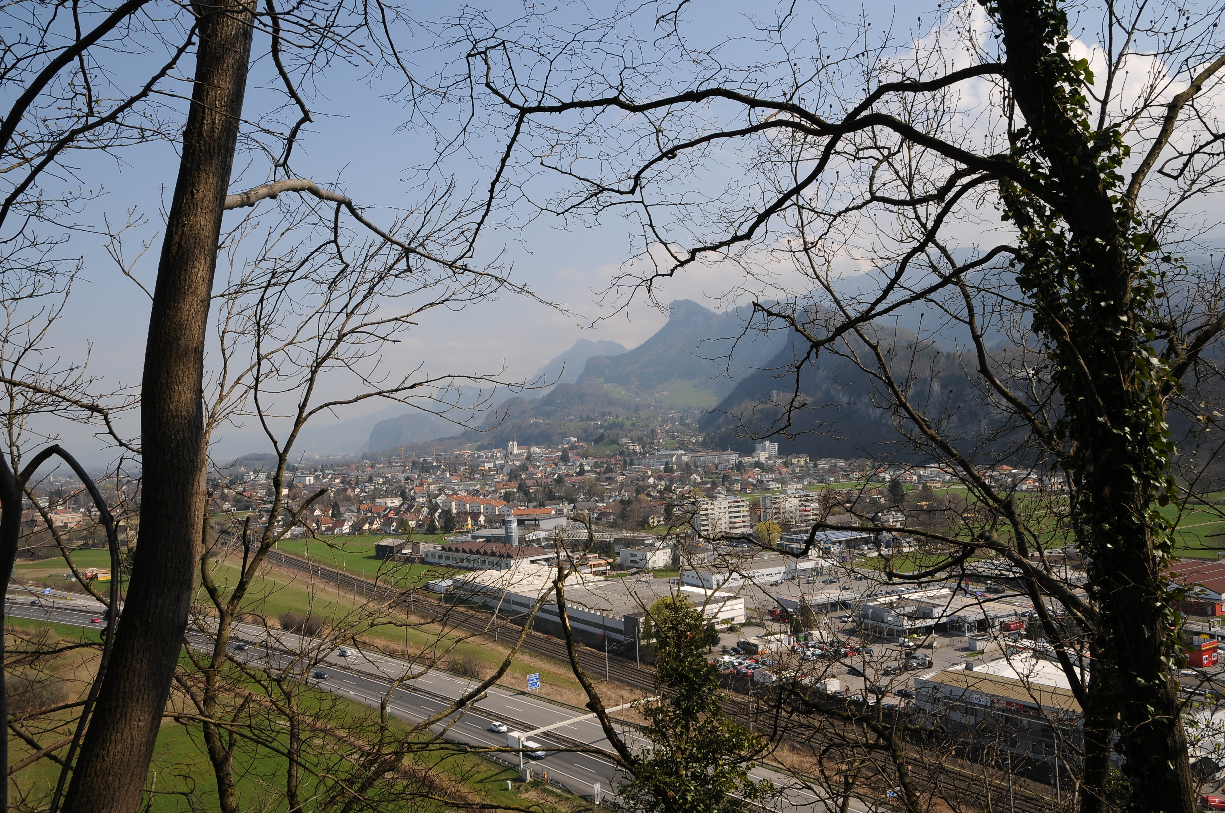 Götzis ist eine Marktgemeinde mit 10.634 Einwohnern (Stand 31. Dezember 2010) im Bundesland Vorarlberg im Bezirk Feldkirch und liegt in der Kummenberg-Region an der Grenze vom Oberen zum Unteren Vorarlberger Rheintal. Blick von der Burgruine Neuburg (Koblach).